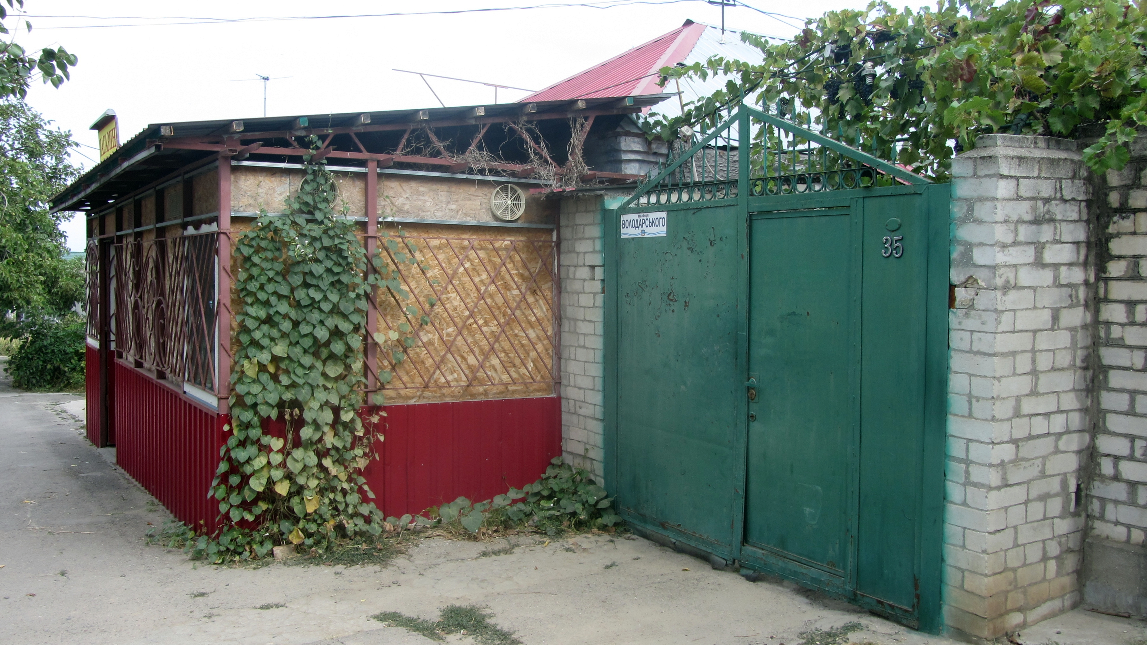 Будинок, в якому 30 вересня 1942 р. проходило 1-ше організаційне засідання Комітету підпільної організації “Миколаївський центр”, Миколаїв, вул. 5-а Воєнна, 35